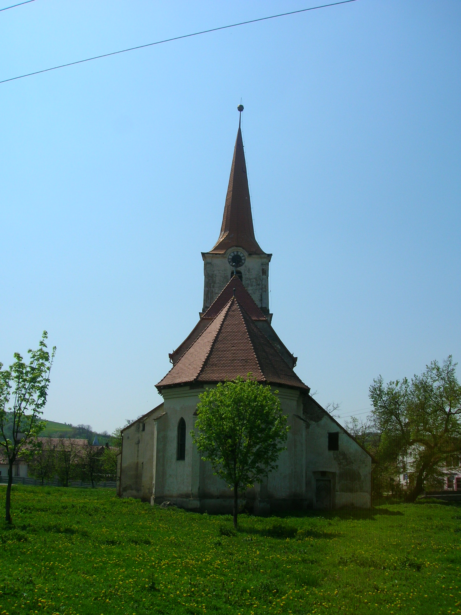 Biserica evanghelică C.A. prima jum. a sec. XIV, 1753, 1799, 1828, 1909